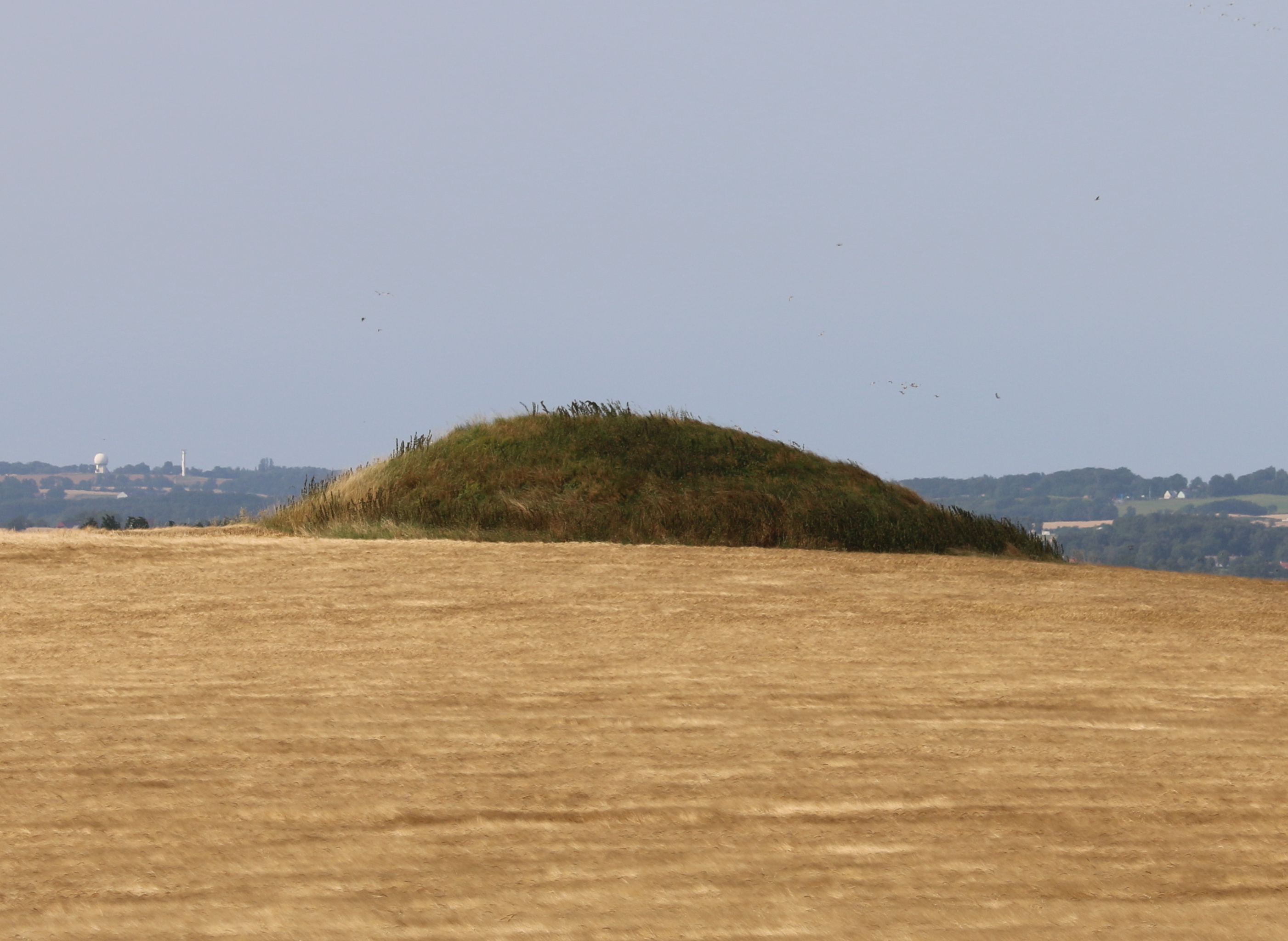 Örsjö 2:1, Hanahög, gravhög